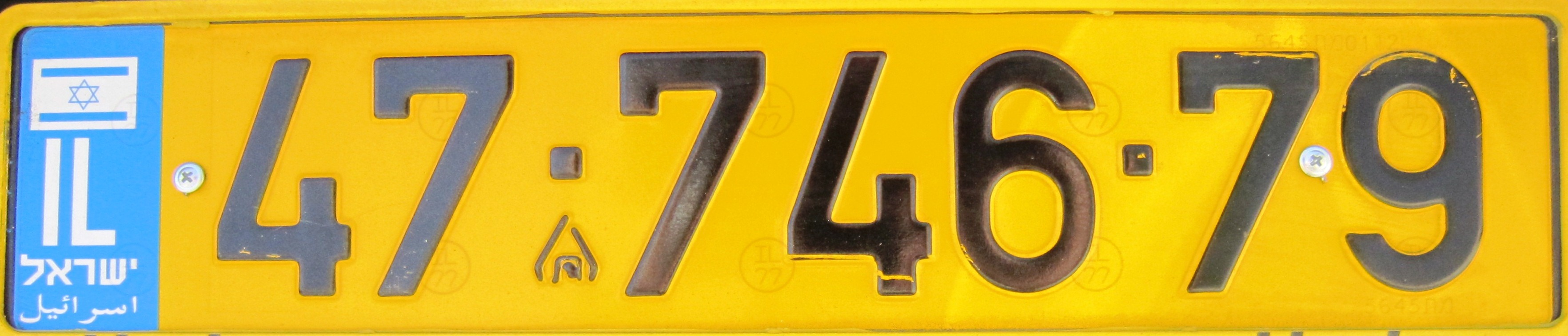 Israel licenseplate 2